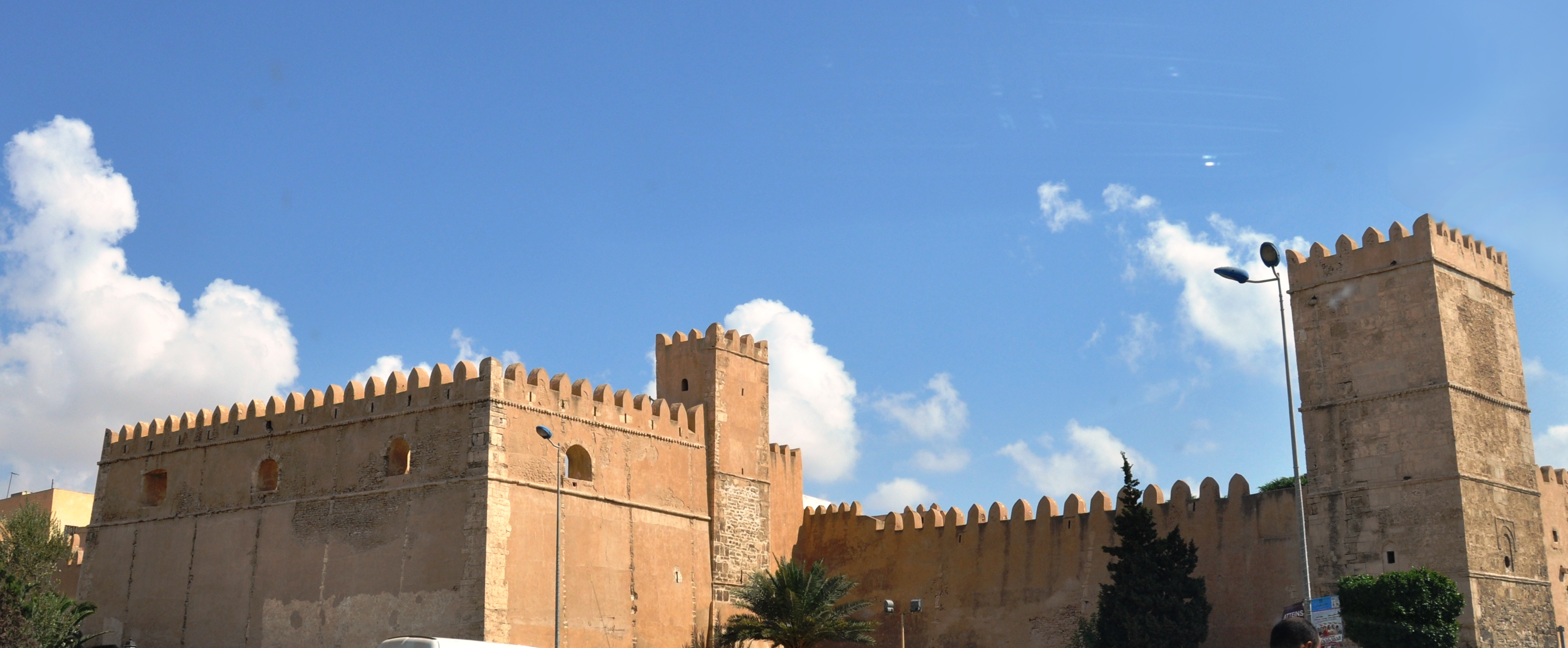 Remparts